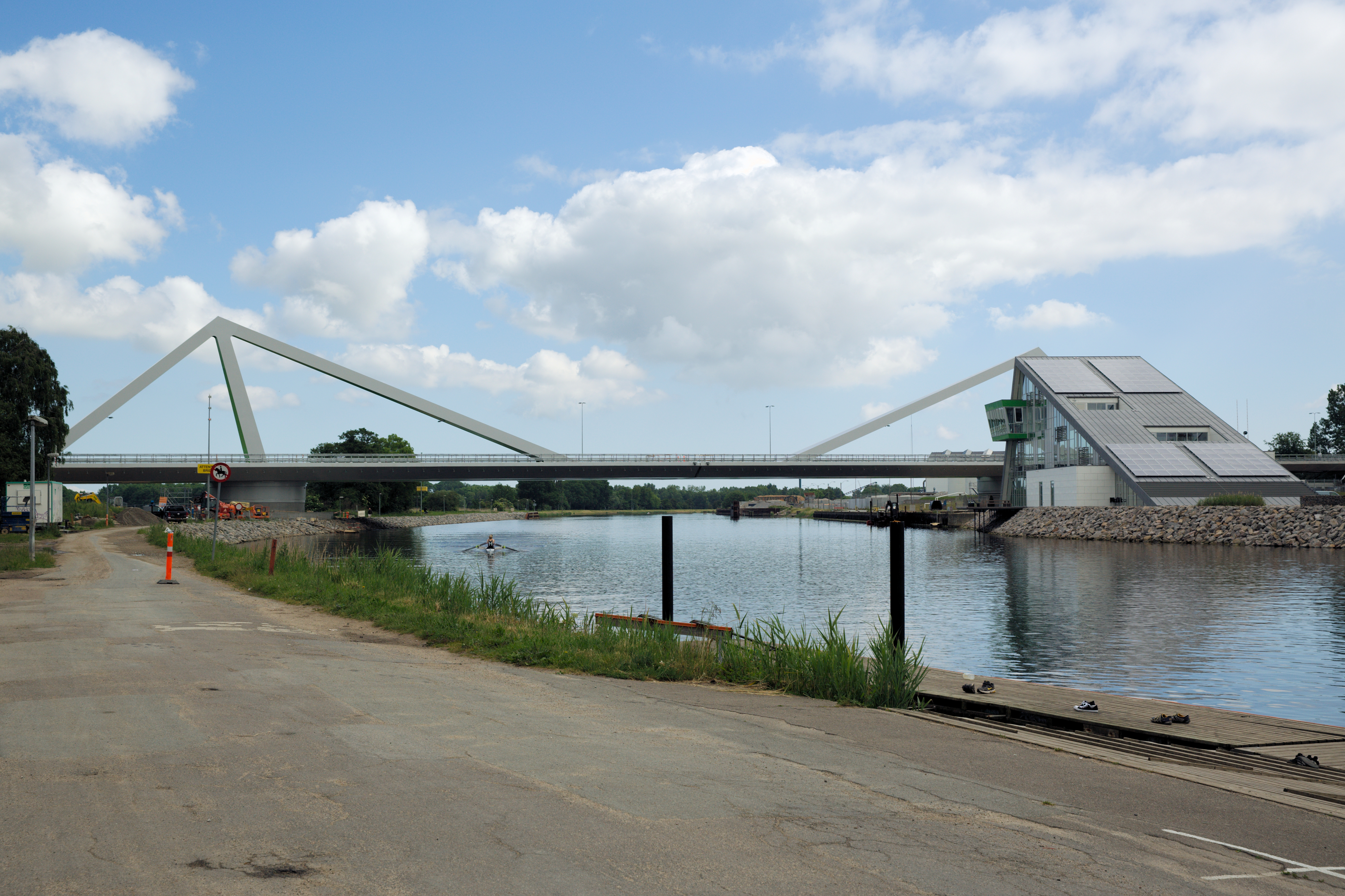 Odins Bros set fra roklubben